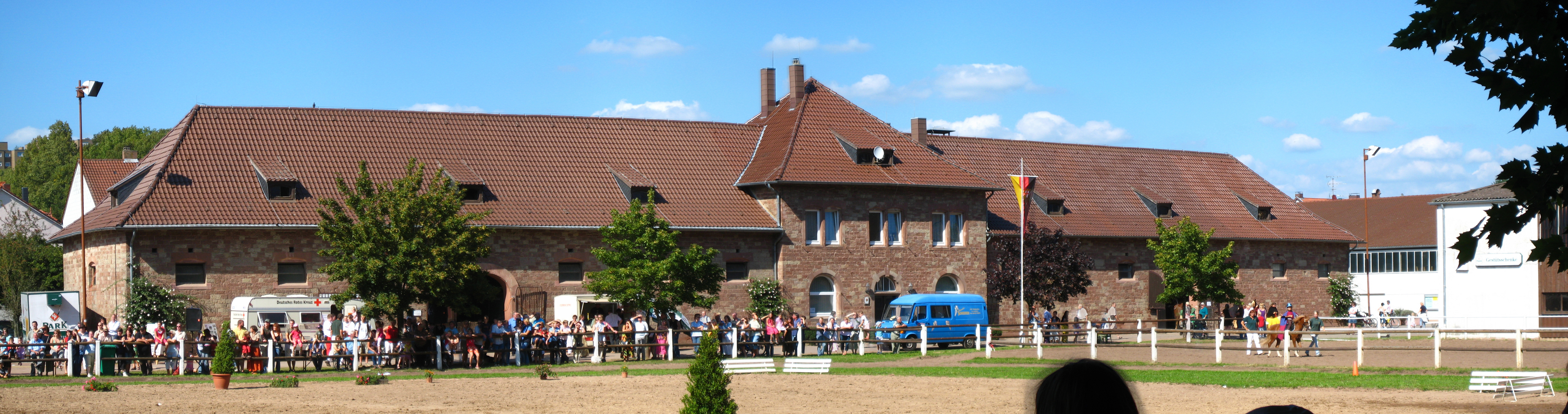 Stud farm "Landgestüt Zweibrücken"